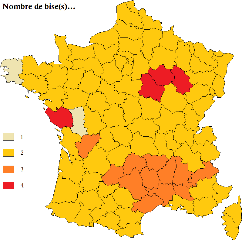 Nombre de bise(s) en France : données issues du site